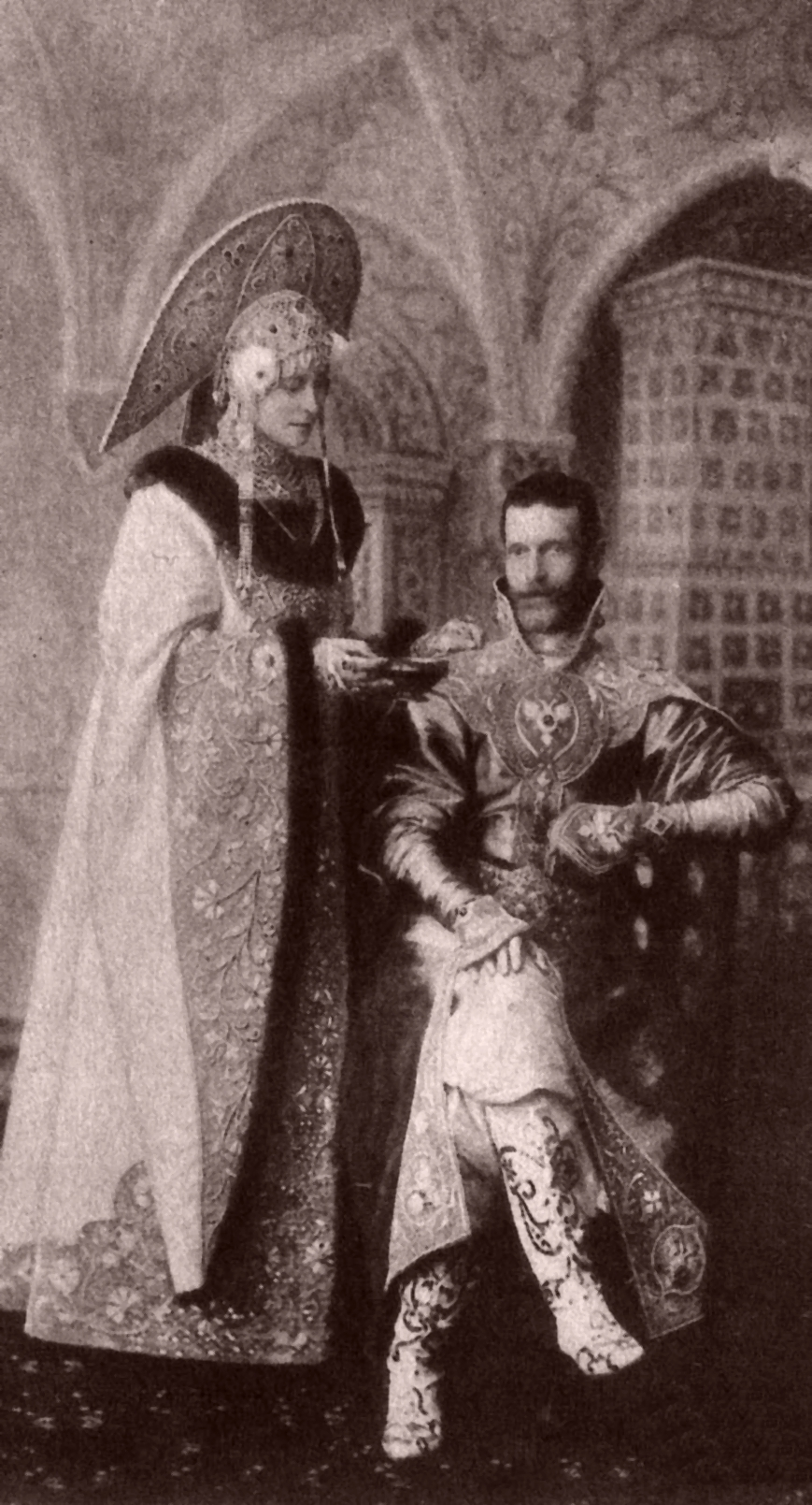 Елизавета Фед. с мужем